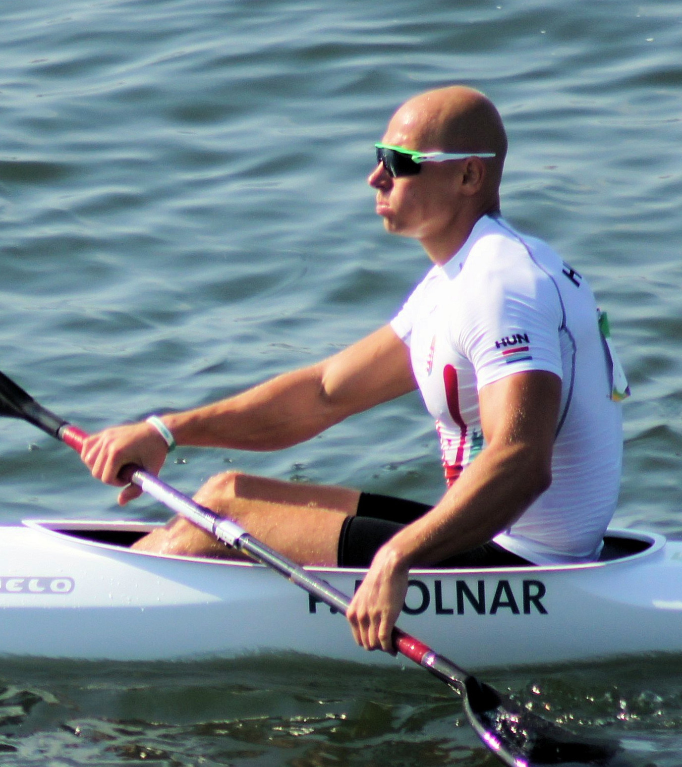 Rio 2016. Canoagem de velocidade/Canoe sprint